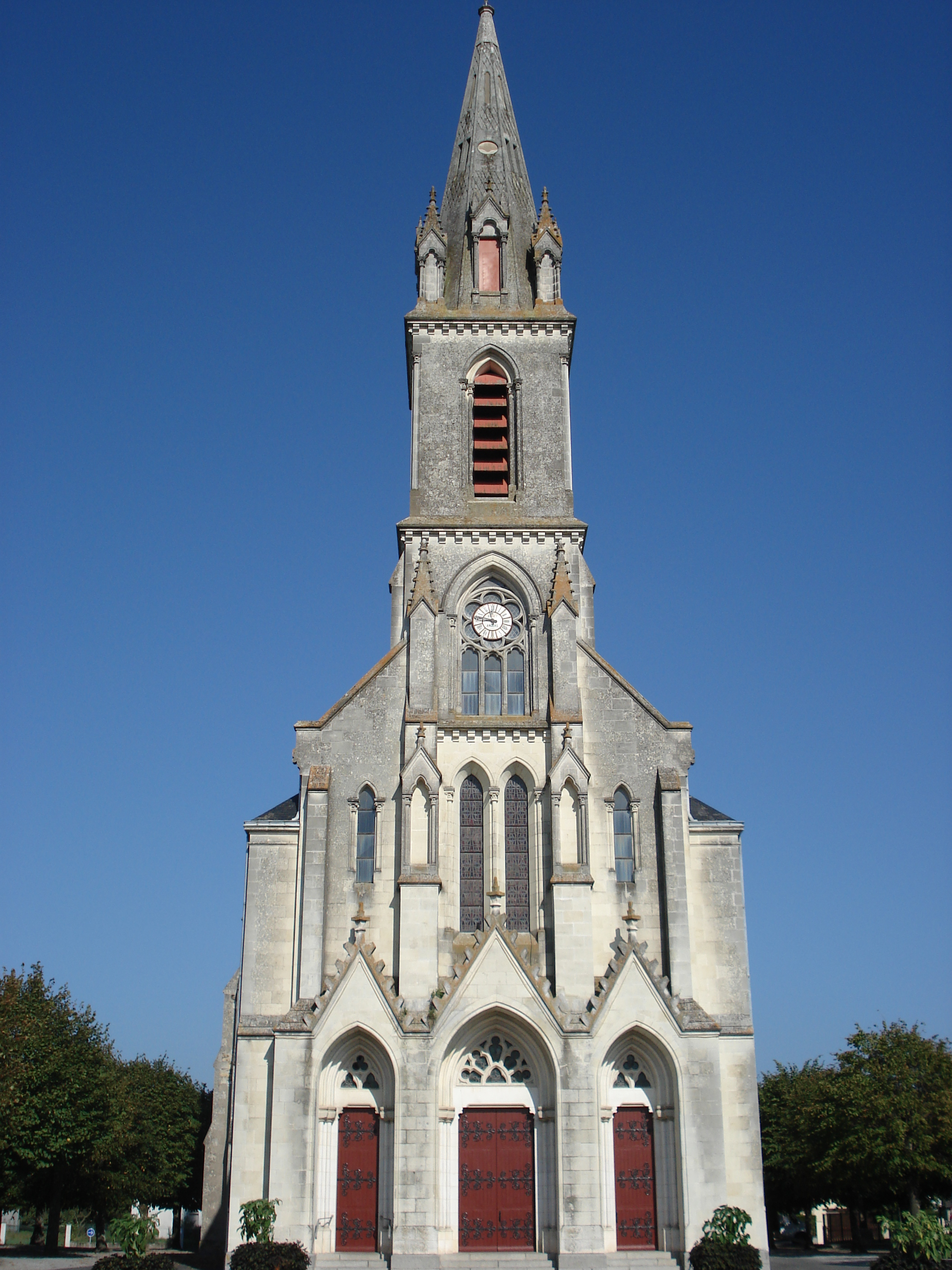 Eglise de Saint-Sylvain d'Anjou dans le Maine et Loire, France